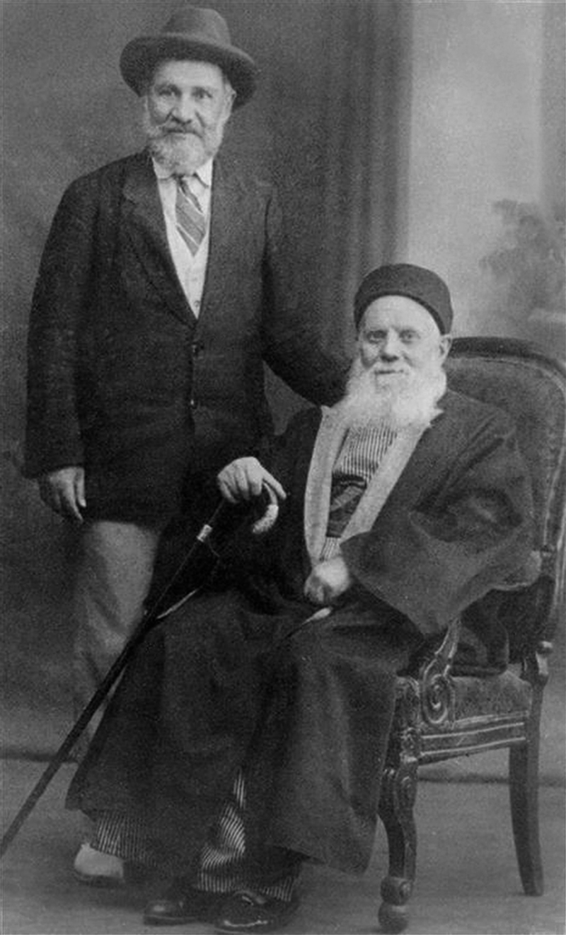 המורה יהודה חיים ענבתי ודודו מצד אביו, הרב אברהם יעקב ענתבי